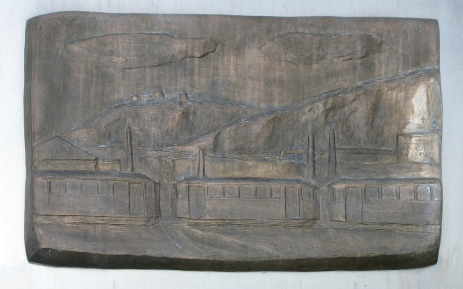 spomenik početku organiziranog javnog prijevoza putnika u Rijeci